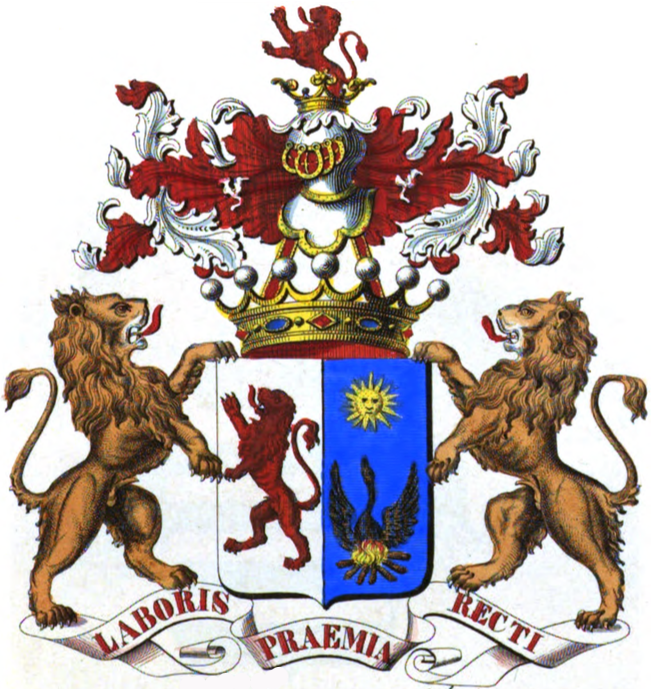 Armoiries de la famille de Terwangne